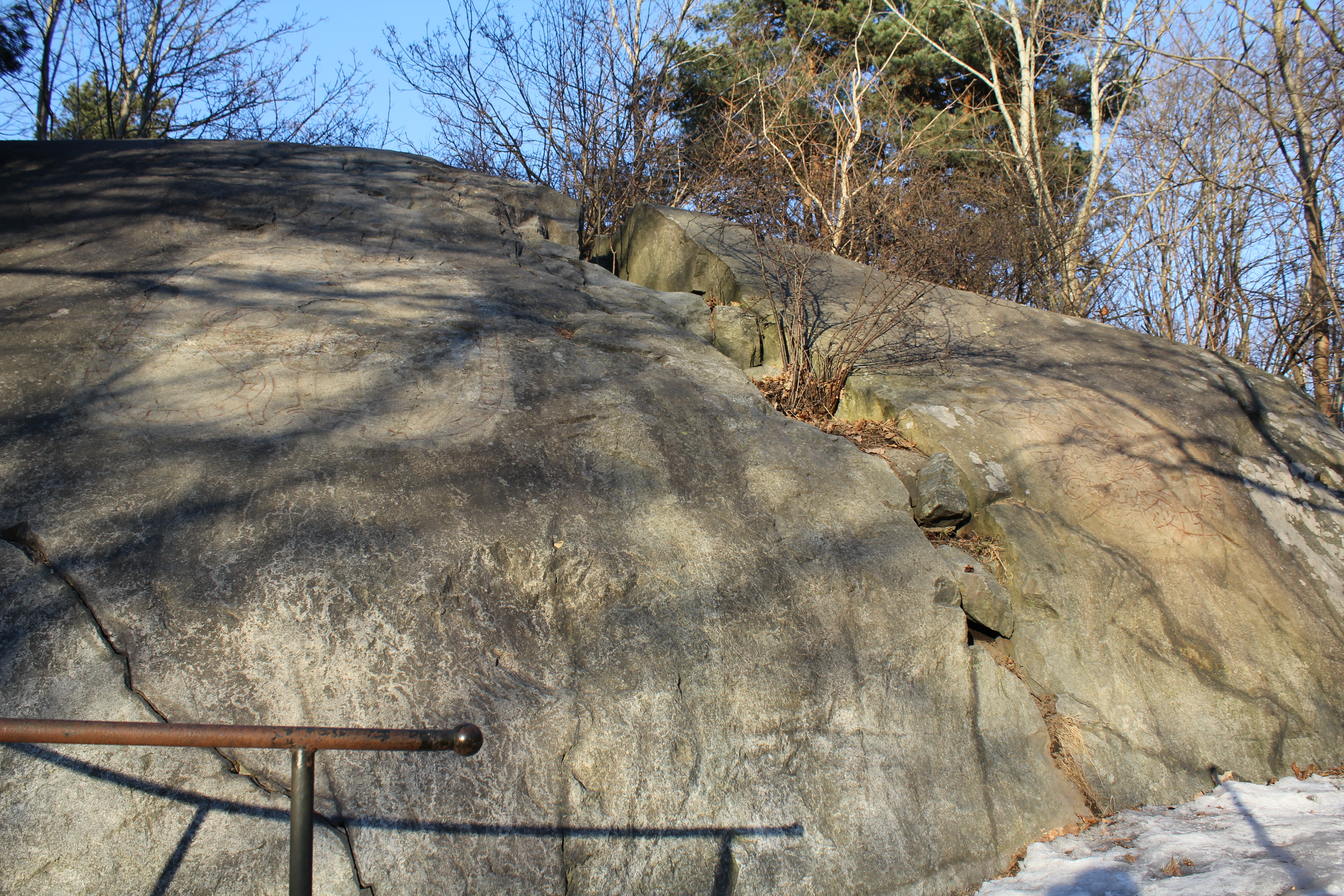 Runhällarna U 58 (t.v.) och U 59 (t.h.) i Riksby, Bromma.